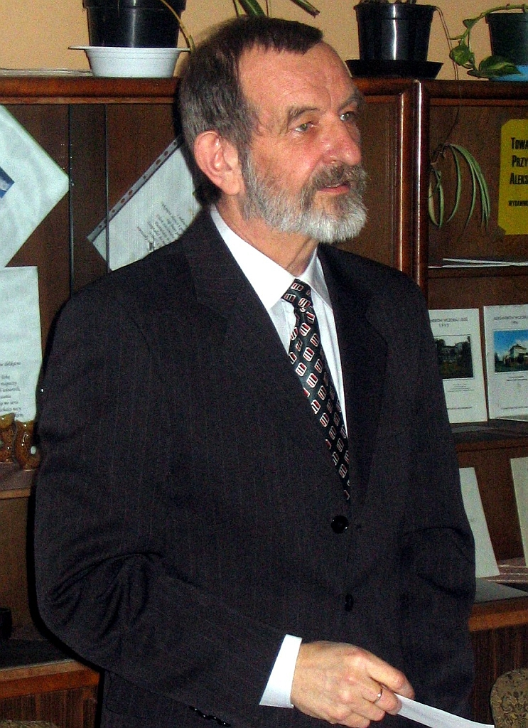 Leszek Pierlejewski - Prezes Towarzystwa Przyjaciół Aleksandrowa Łódzkiego